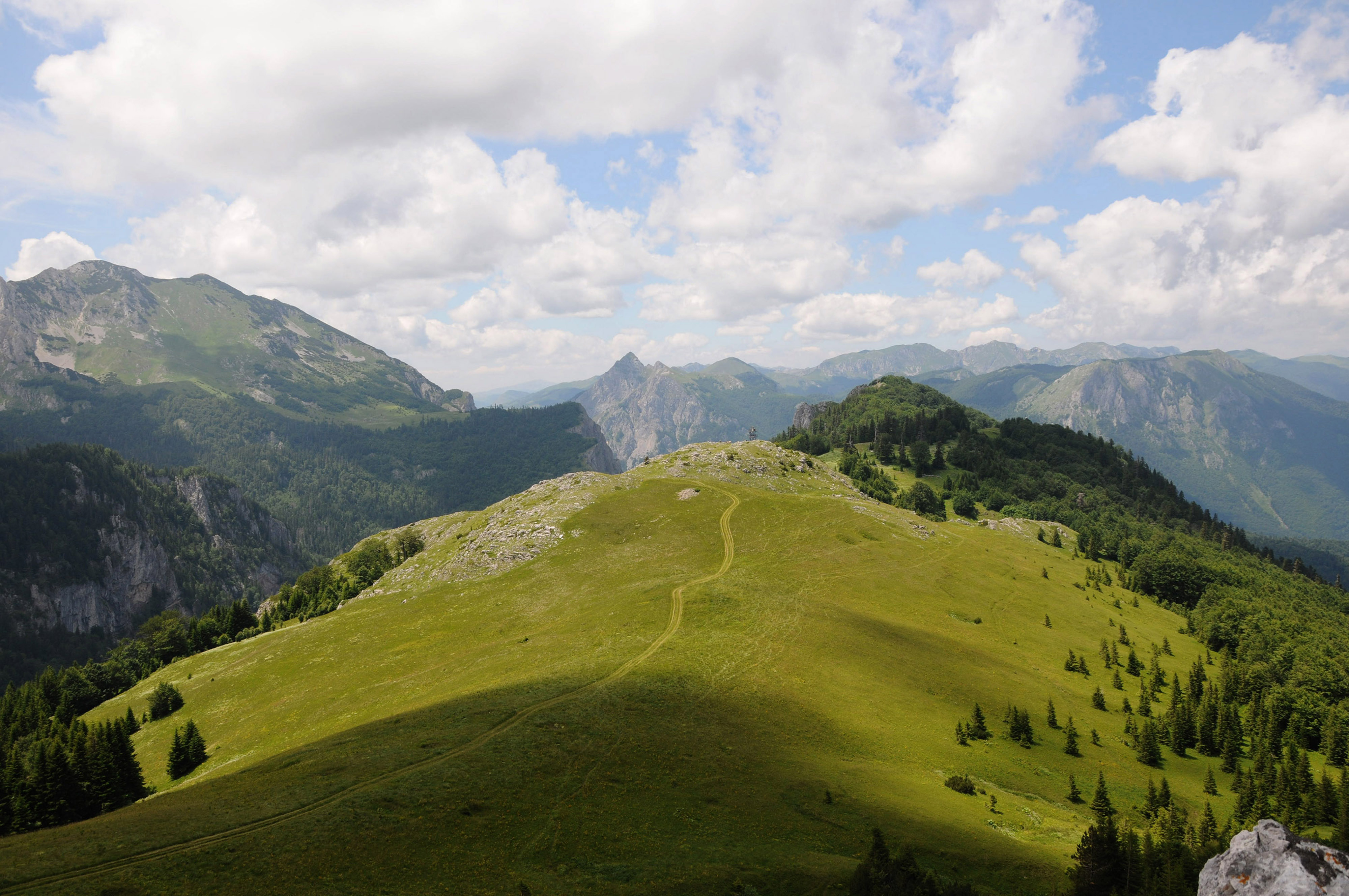 NP Sutjeska planina Prijevor Сликава е подигната во рамките на проектот „По трагата на душата 2015“.